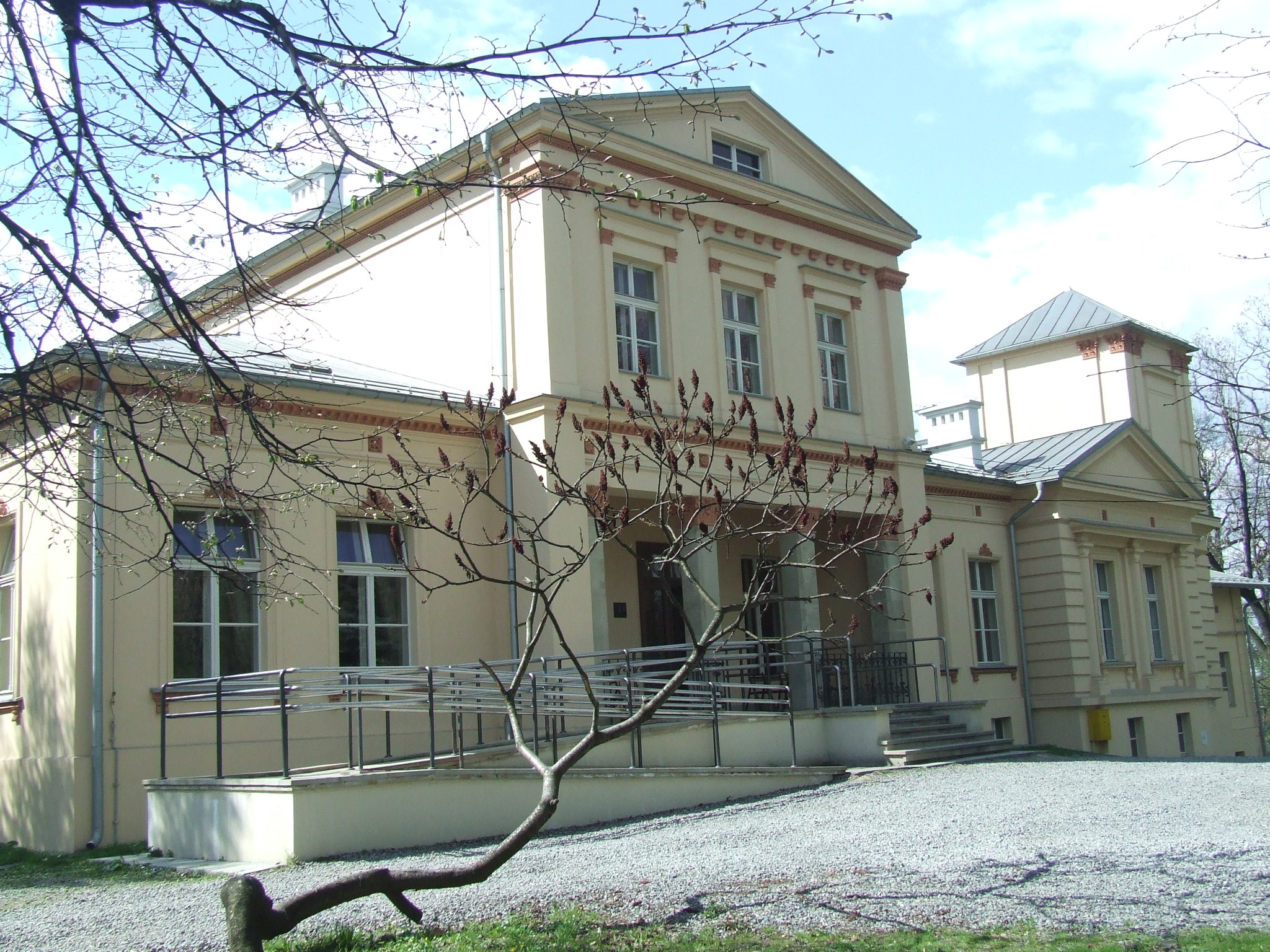 Dwór Czeczów w Bieżanowie(Kraków), Poland